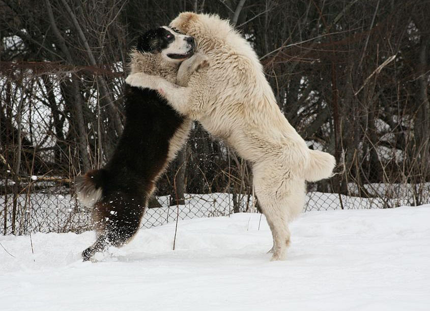 Среднеазиатские овчарки. Естественная борьба за лидерство в стае.